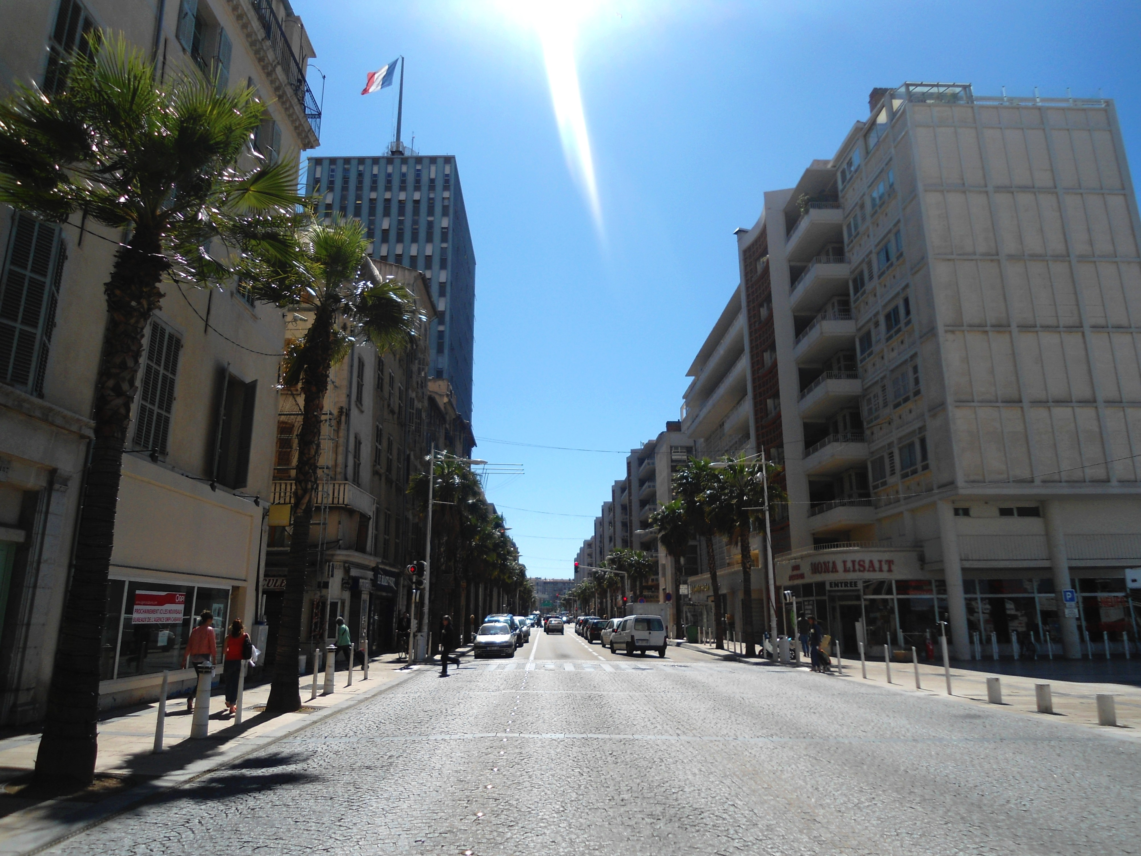 Carrer de la Republica